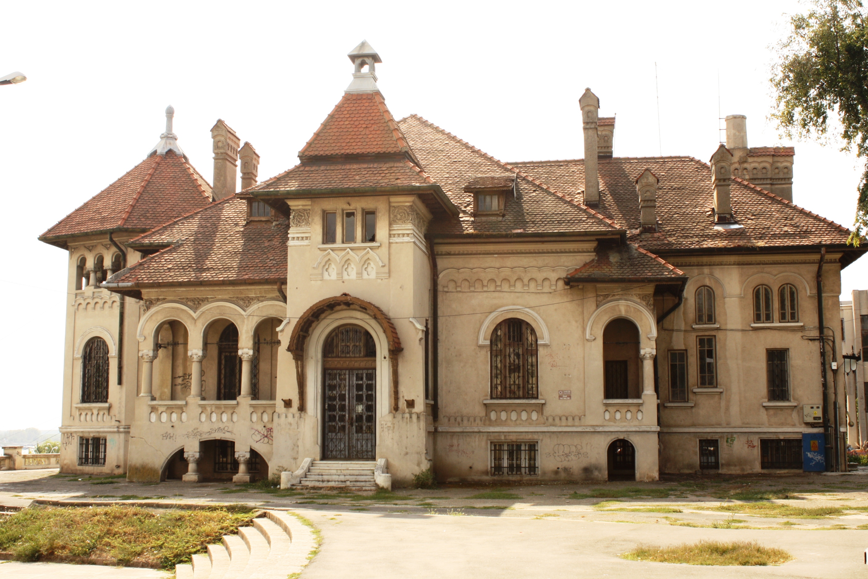 Casa - înc. sec. XX - Piața Independenței 1A, Braila